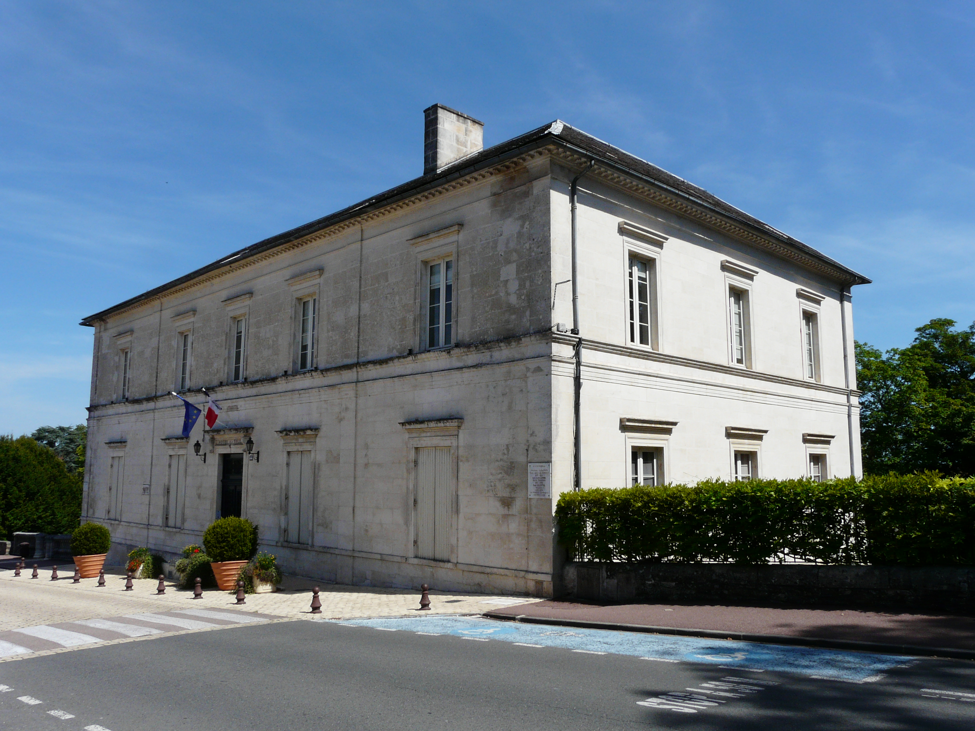 L'hôtel de ville de Thiviers, Dordogne, France.